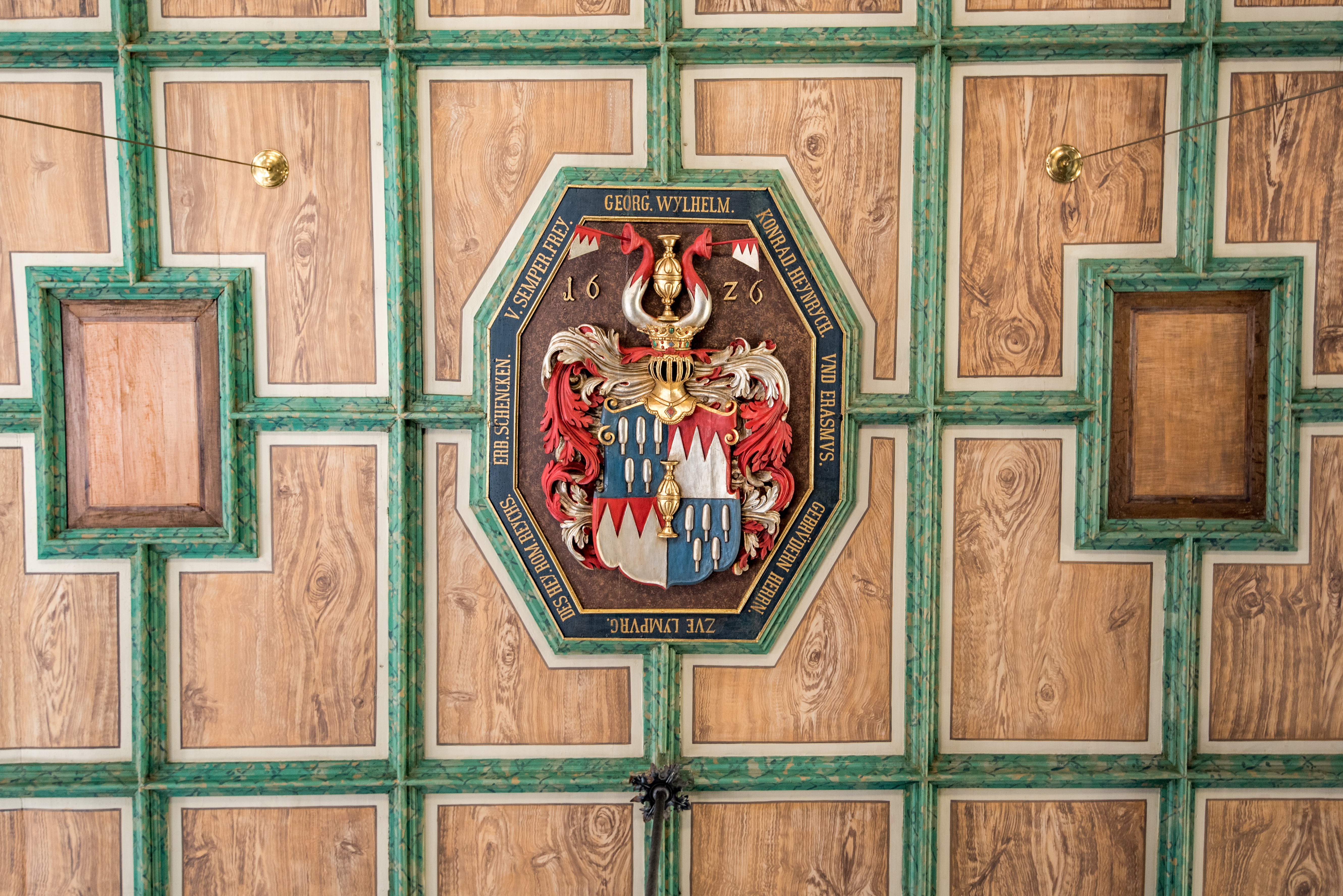 Markt Einersheim, Kirchplatz 1, Evang.-Luth. Pfarrkirche St. Matthäus; Decke mit Wappen der Schenken zu Limpurg Inschrift: GEORG.WILHELM./KONRAD.HEINRICH./UND ERASMUS/GEBRÜDERN HERRN/ZUE LIMPURG./DES HEY.ROM.REYCH./ERB.SCHENCKEN./U.SEMPER.FREY.